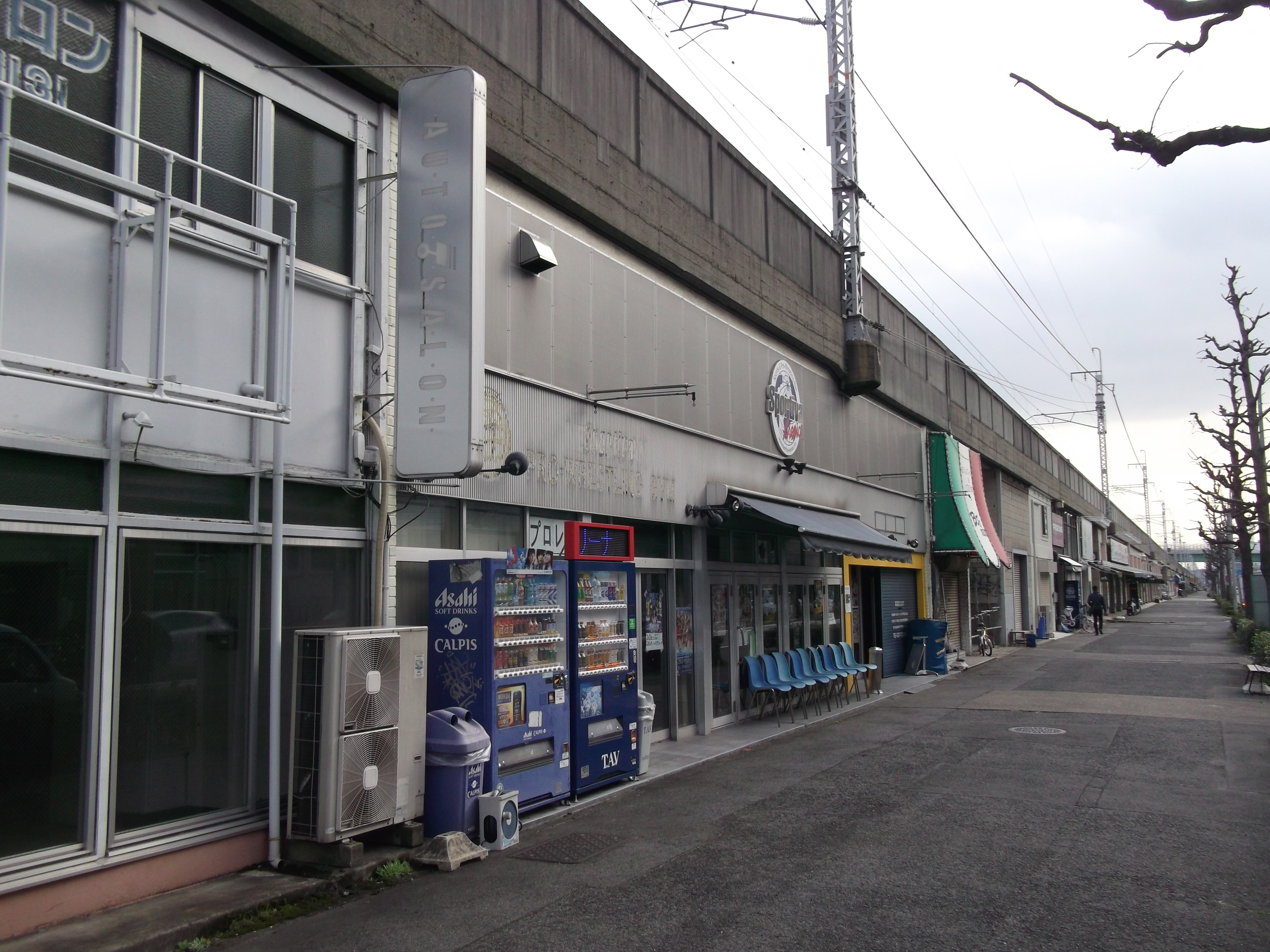 名古屋市中区千代田三丁目のスポルティーバエンターテイメントを北東側より撮影